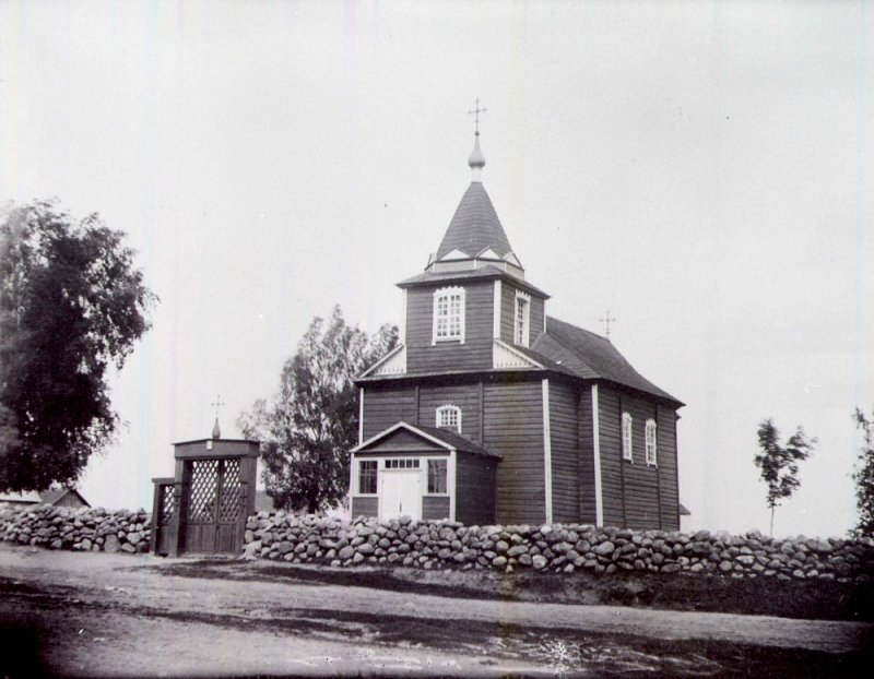 Беларуская (тарашкевіца): Княгінін (Kniahinin). Траецкая царква